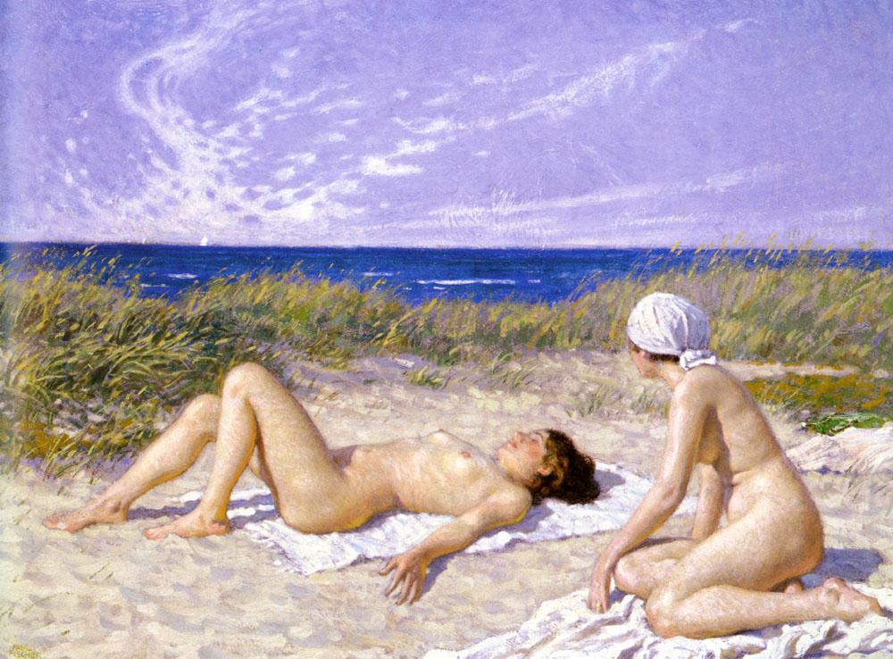 Bain de soleil sur la dune